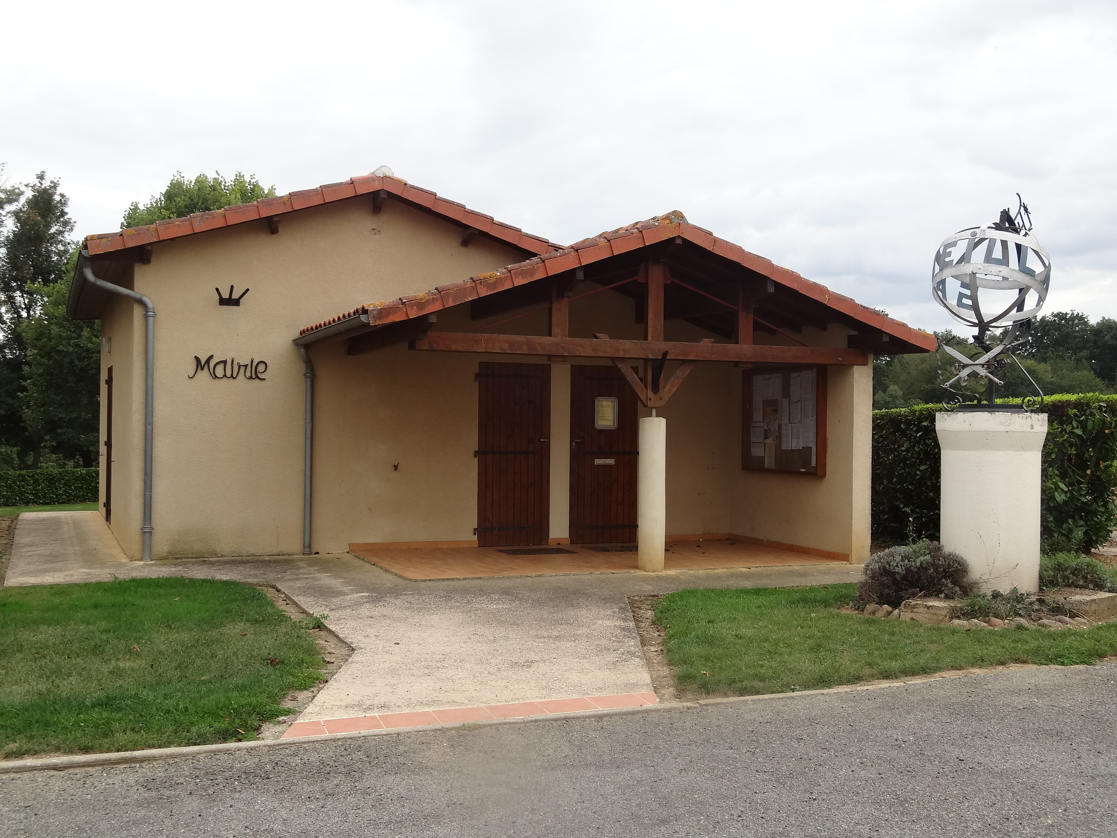 Mairie et sculpture de Sadeillan.